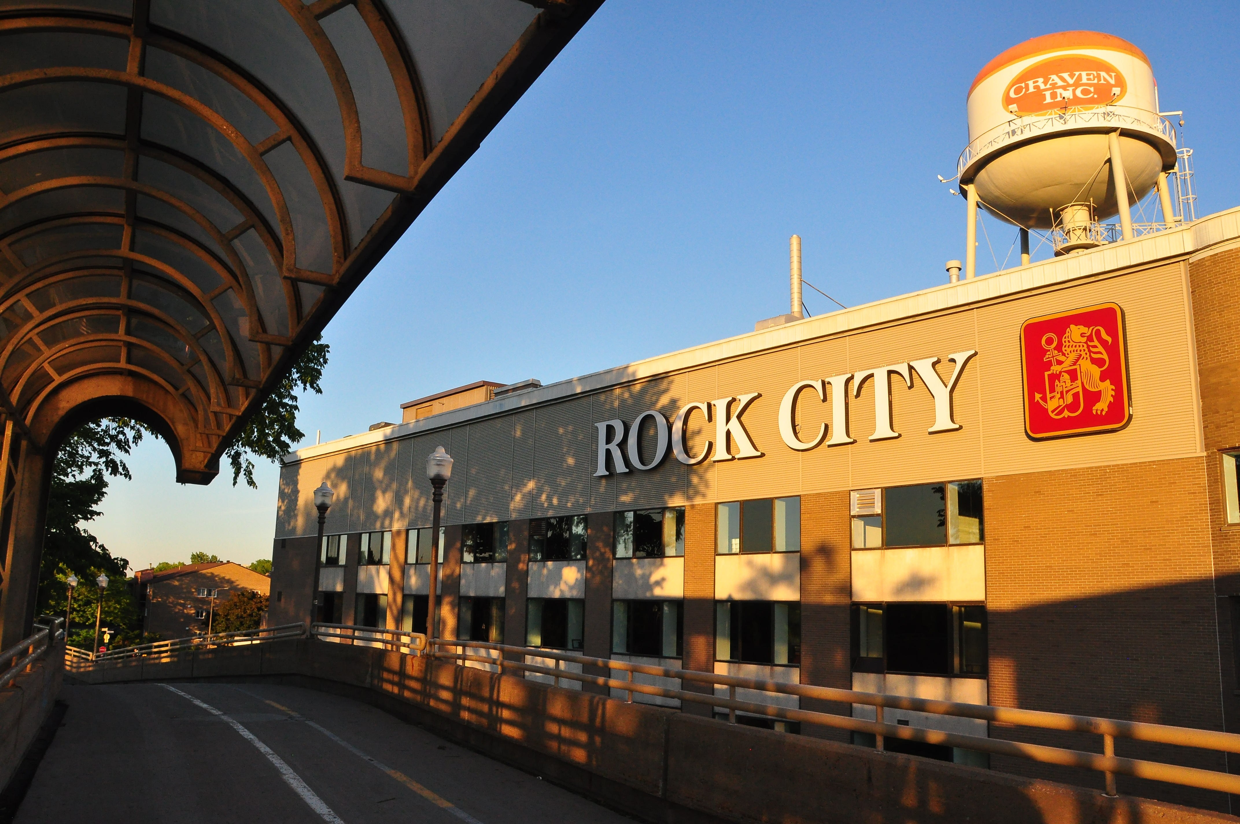 Passerelle Adrien-Pouliot dans Saint-Rock (ville de Québec), adossé à la manufacture de tabac Rock City (RBH).